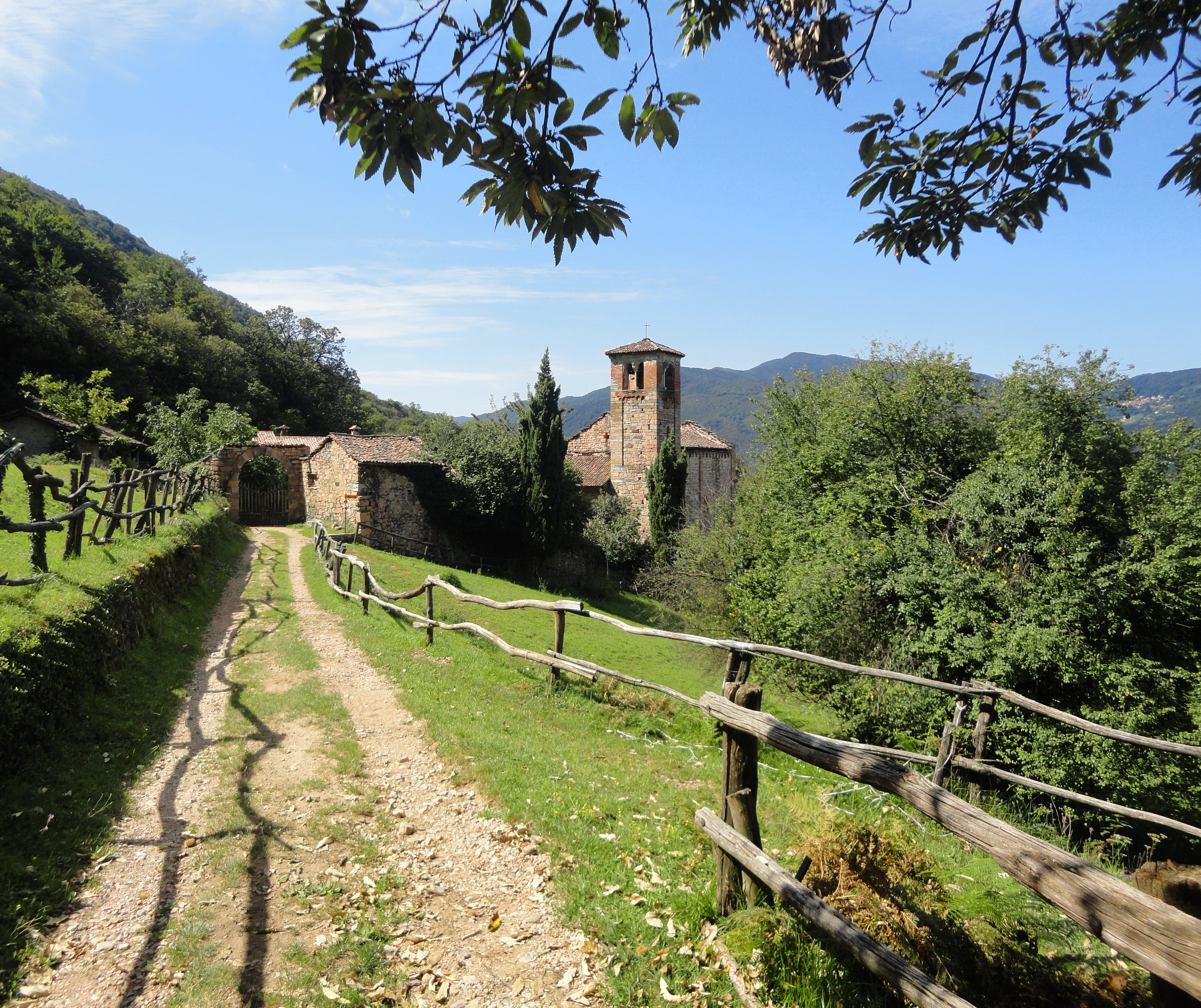 Carona - Complesso di Torello